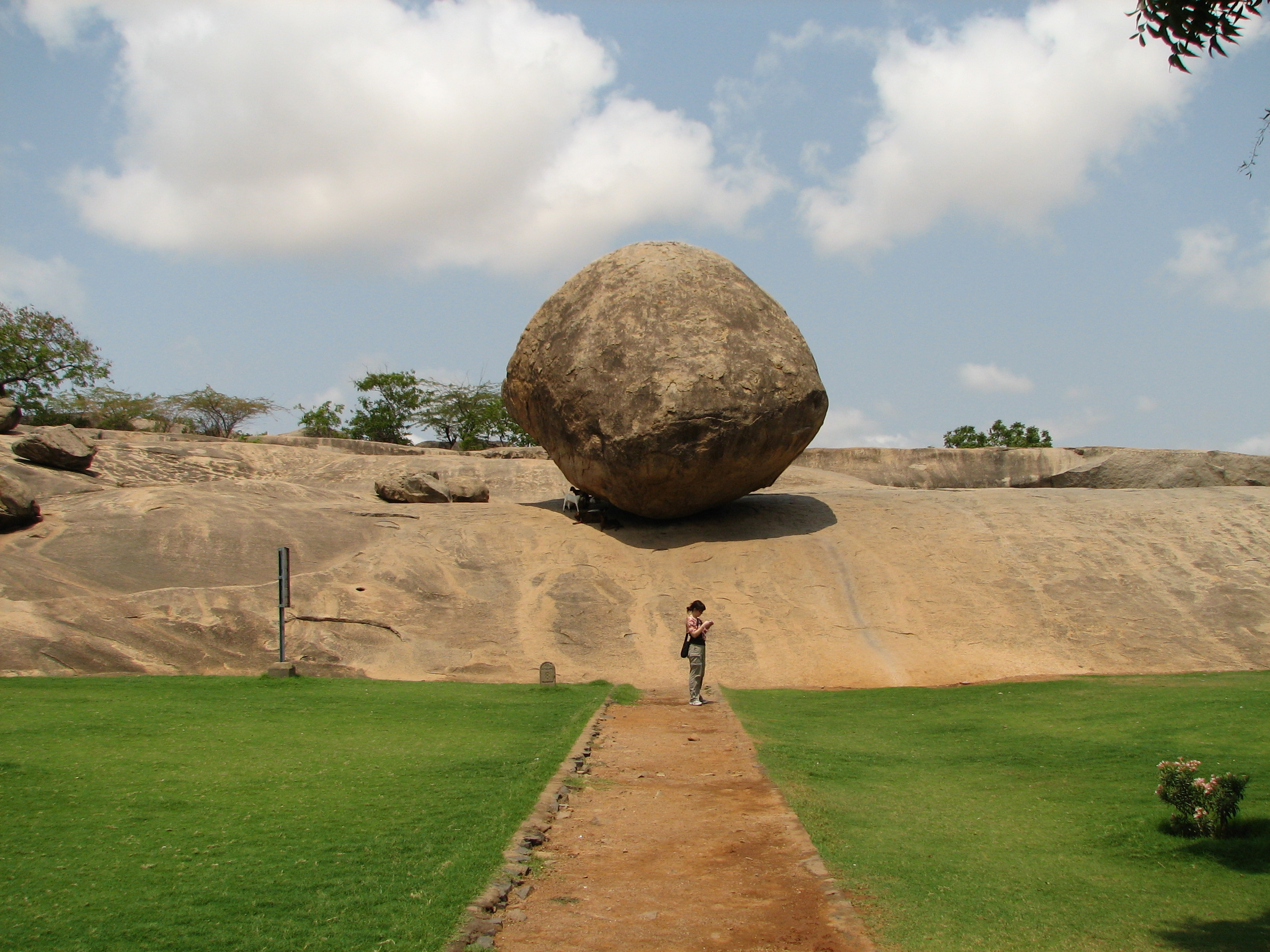 కృష్ణుని వెన్నముద్ద (బట్టర్ బాల్).